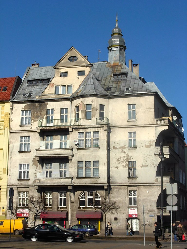 Budynek na rogu al. Adama Mickiewicza i ul. 20 I 1920 r. w Bydgoszczy